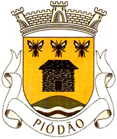 Brasão de Piódão (Portugal)